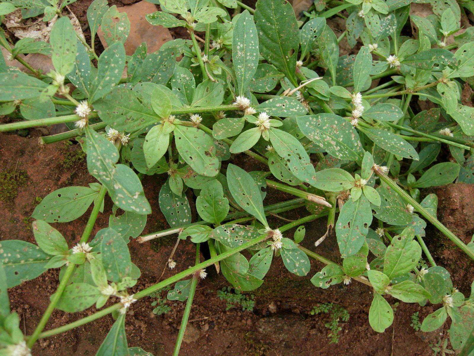 പൊ്ന്നാംകണ്ണി